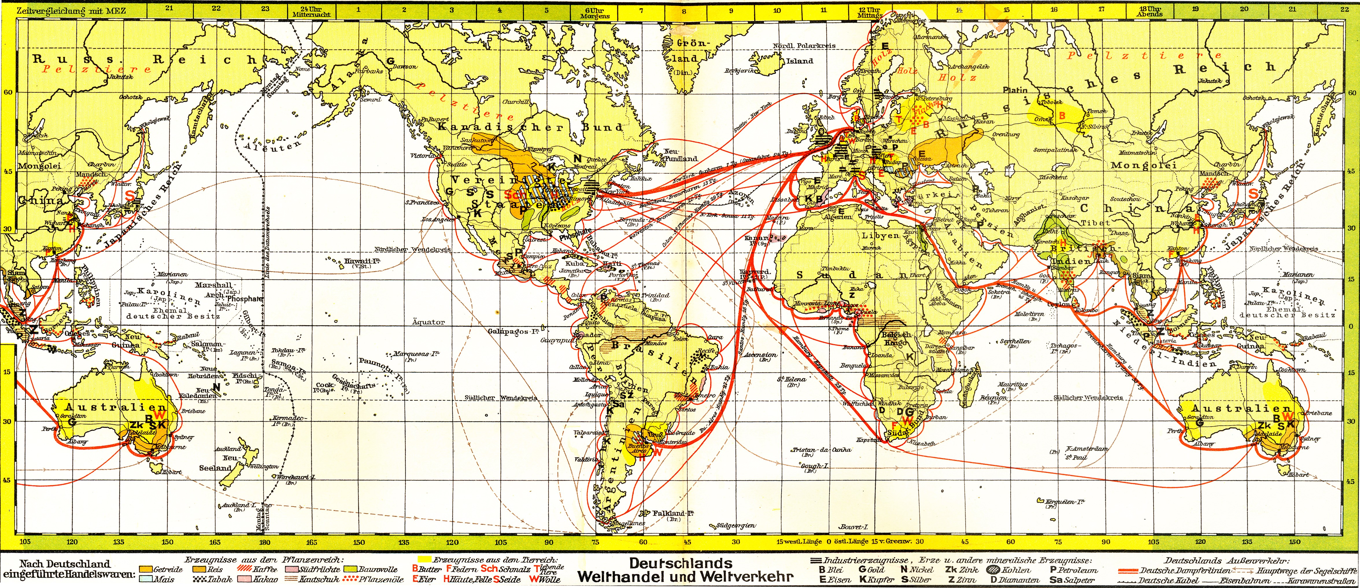 Erdkarte, Deutschlands Welthandel und Weltverkehr This is a part of an old atlas. It does not represent the current situation.